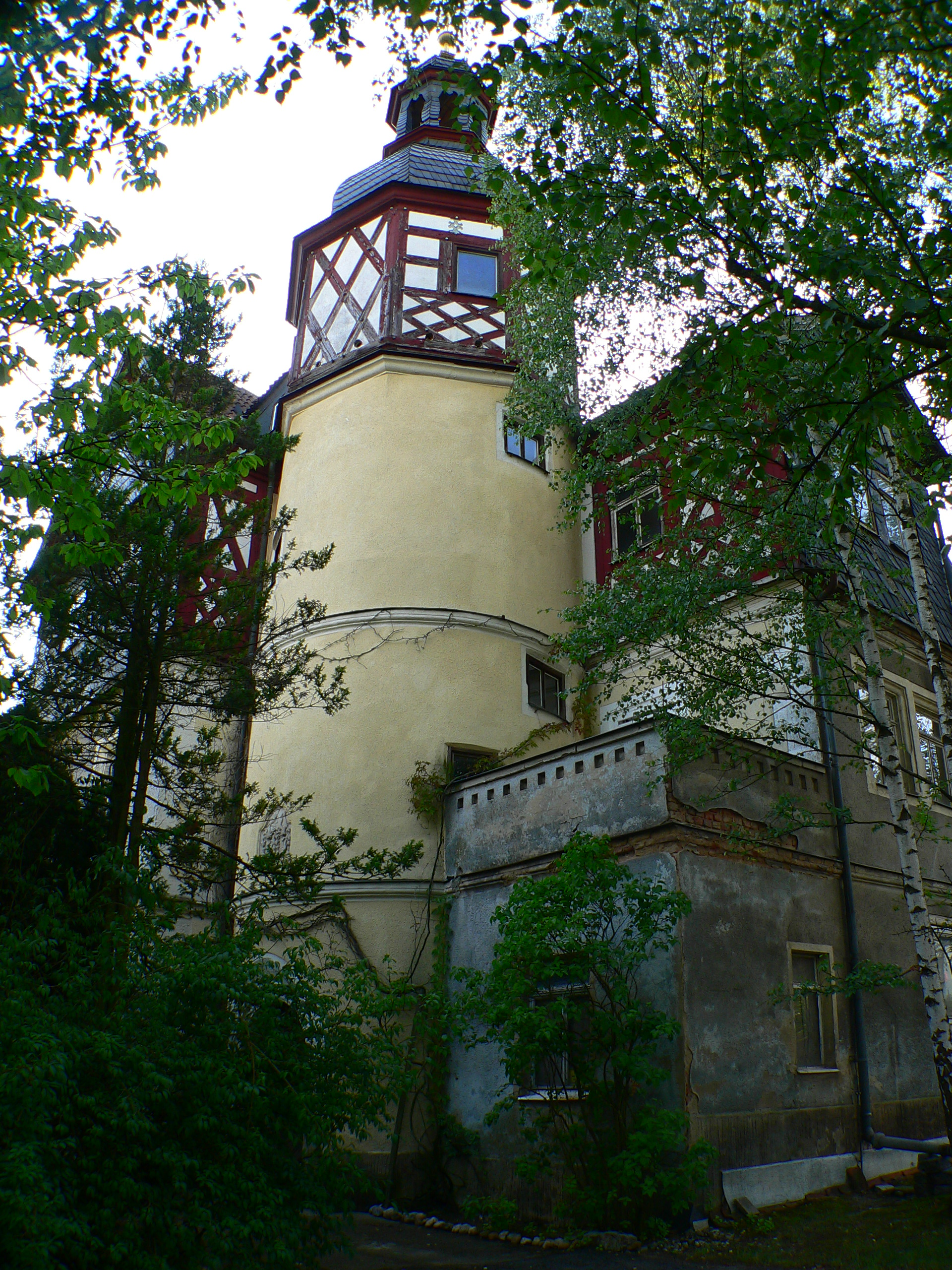 Oberes Schloss in Untersiemau, Kreis Coburg, Bayern